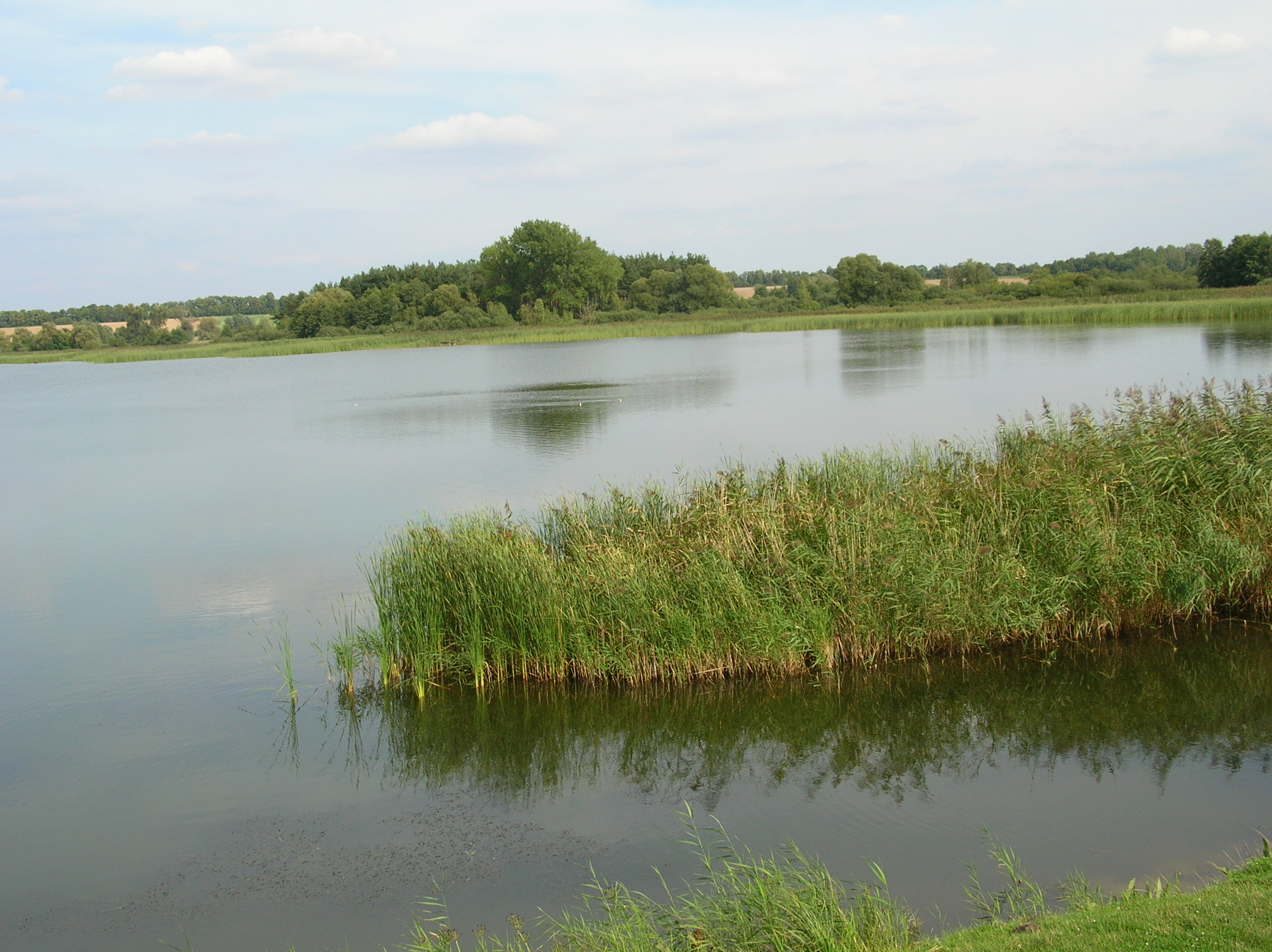 Lake Biskupin